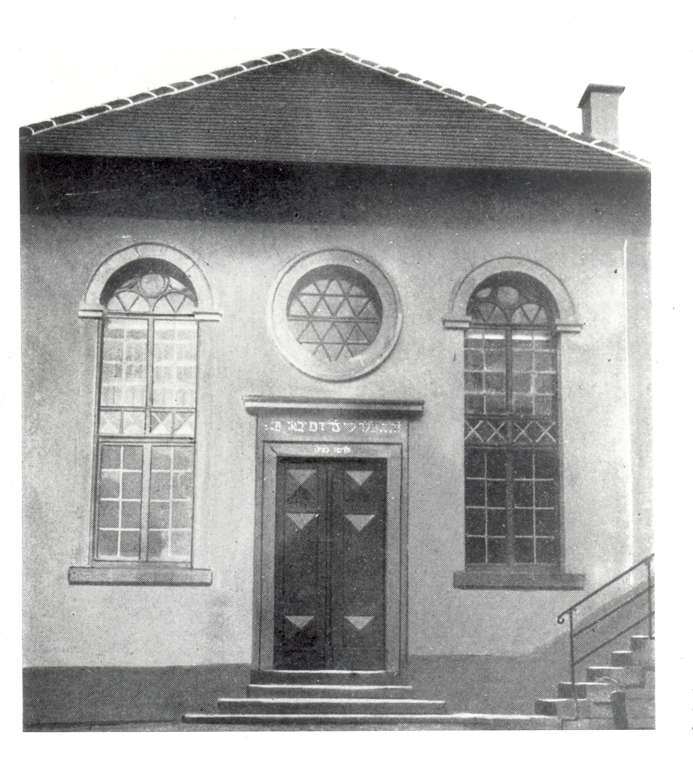 Synagoge (Ernsbach) Nutzungsbedingungen ausdrücklich auch für Wikipedia (siehe: [1]